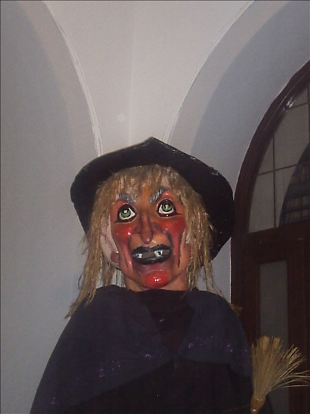 Gigantes de Alcalá de Henares